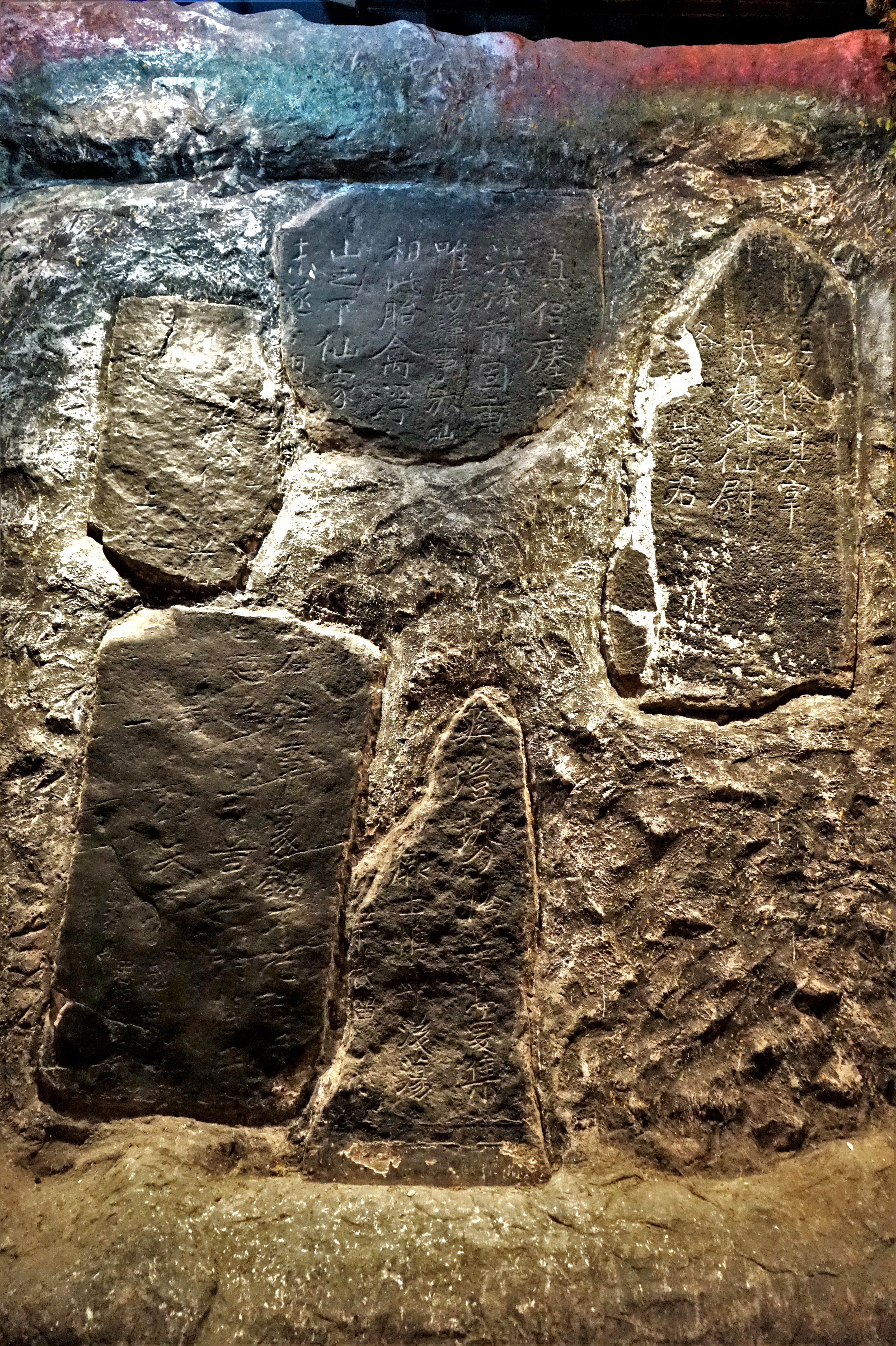 中文（中国大陆）: 瘗鹤铭。传南朝陶弘景书。